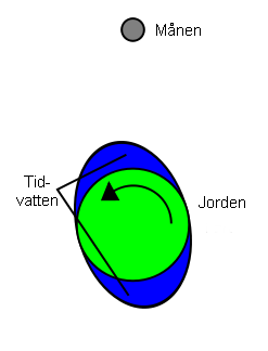 Figuren förklarar hur tidvattnet bromsar